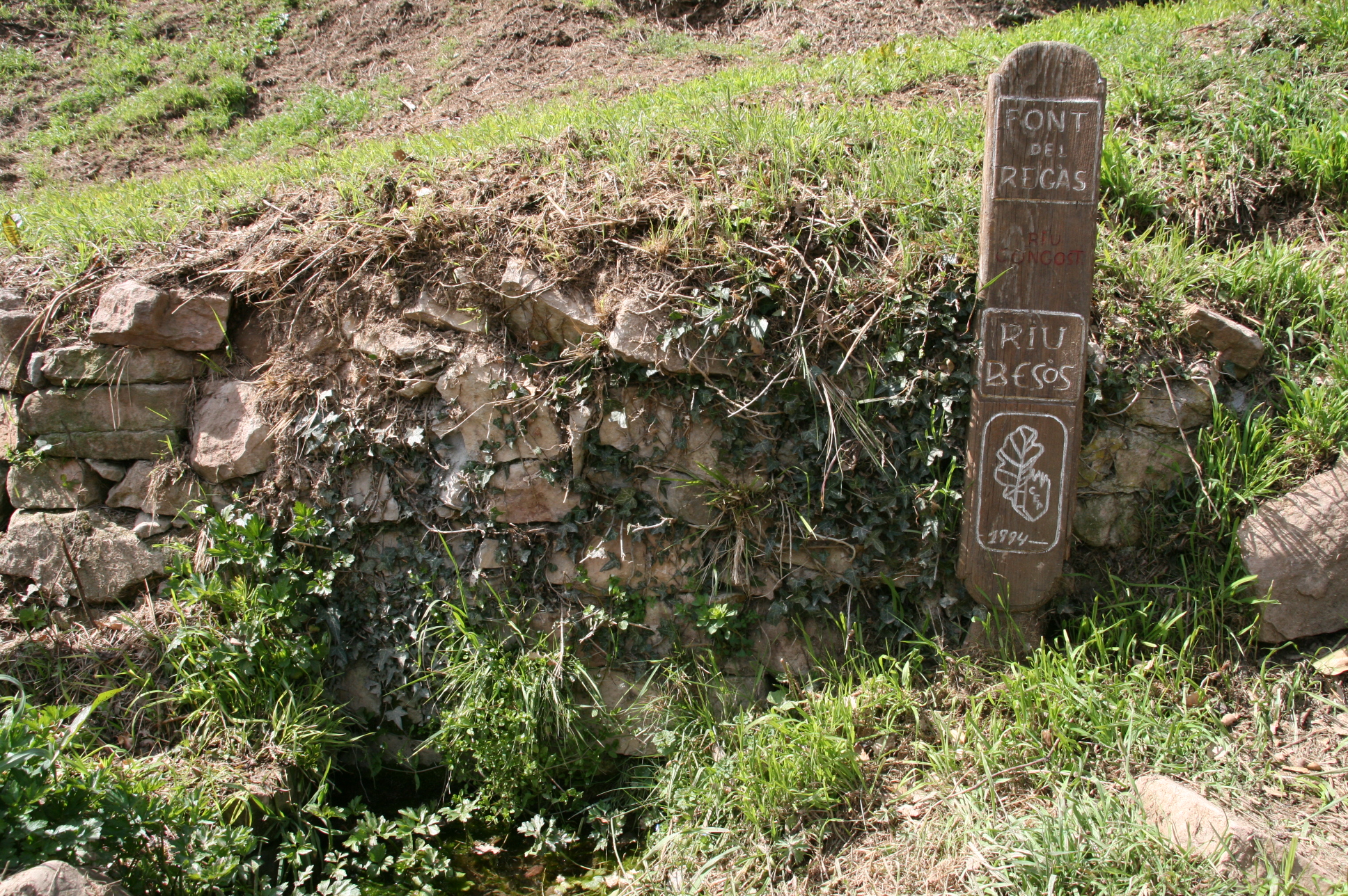 La font del Regàs (Sant Cugat de Gavadons) és l'inici del riu Congost